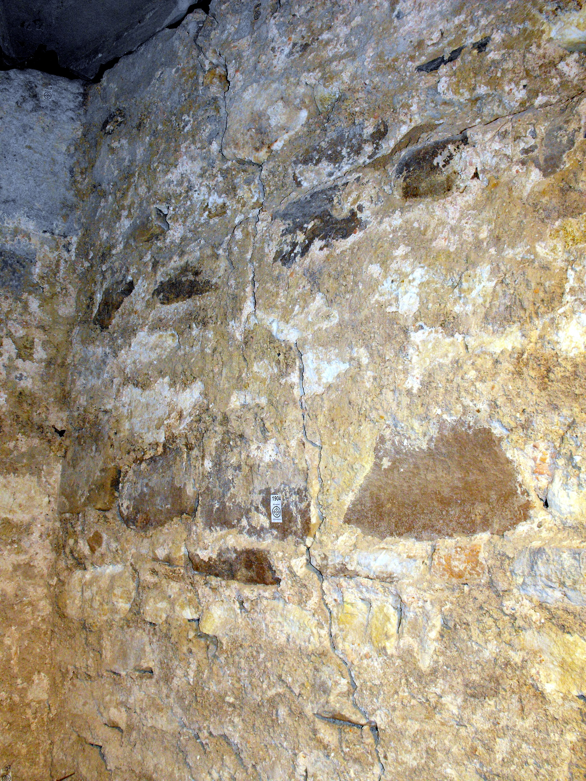 Erdbebenriss an den Fundamenten des Aachener Doms